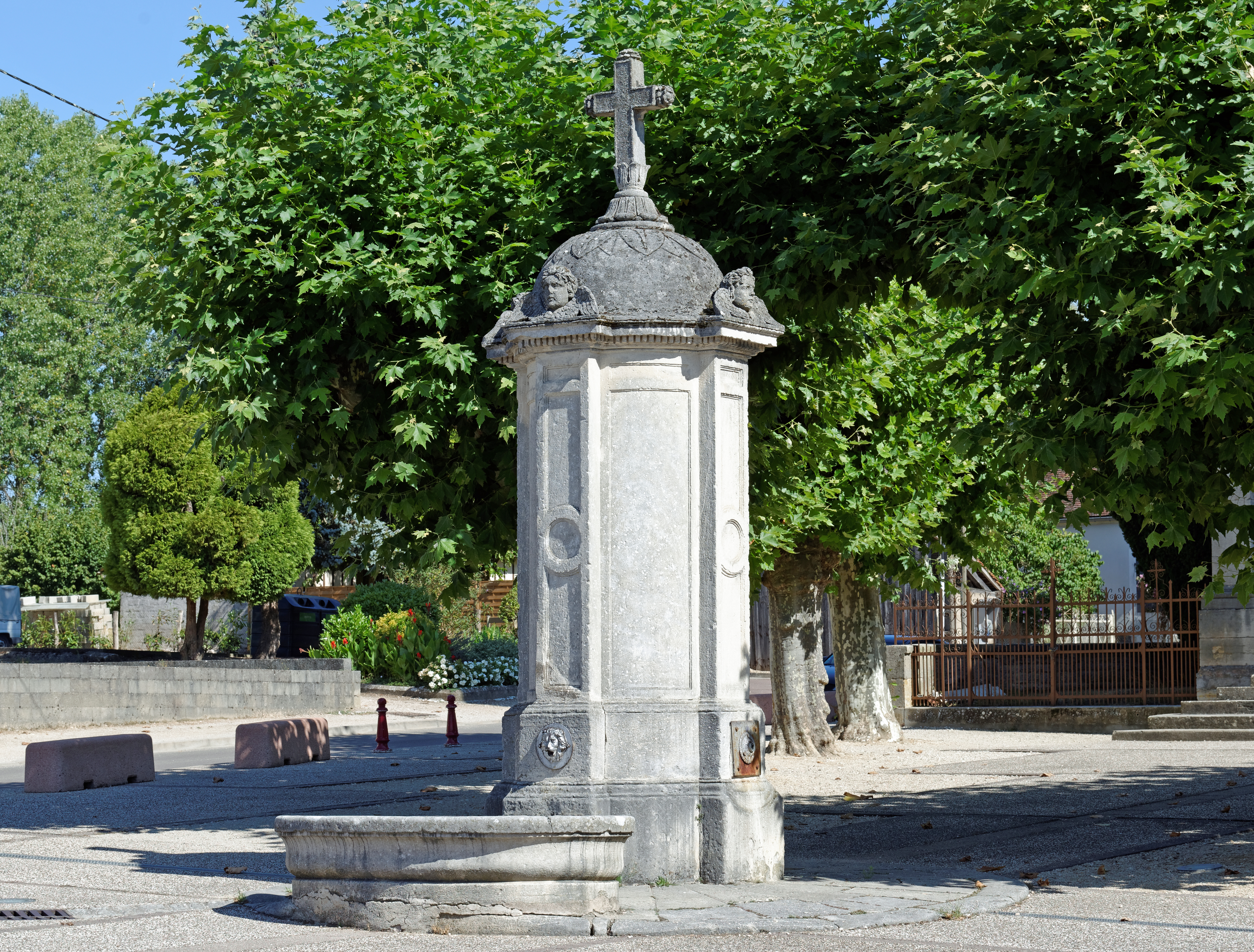 La fontaine de Longchamp, place de l'église. (Longchamp, Côte d'Or, Bourgogne, France)